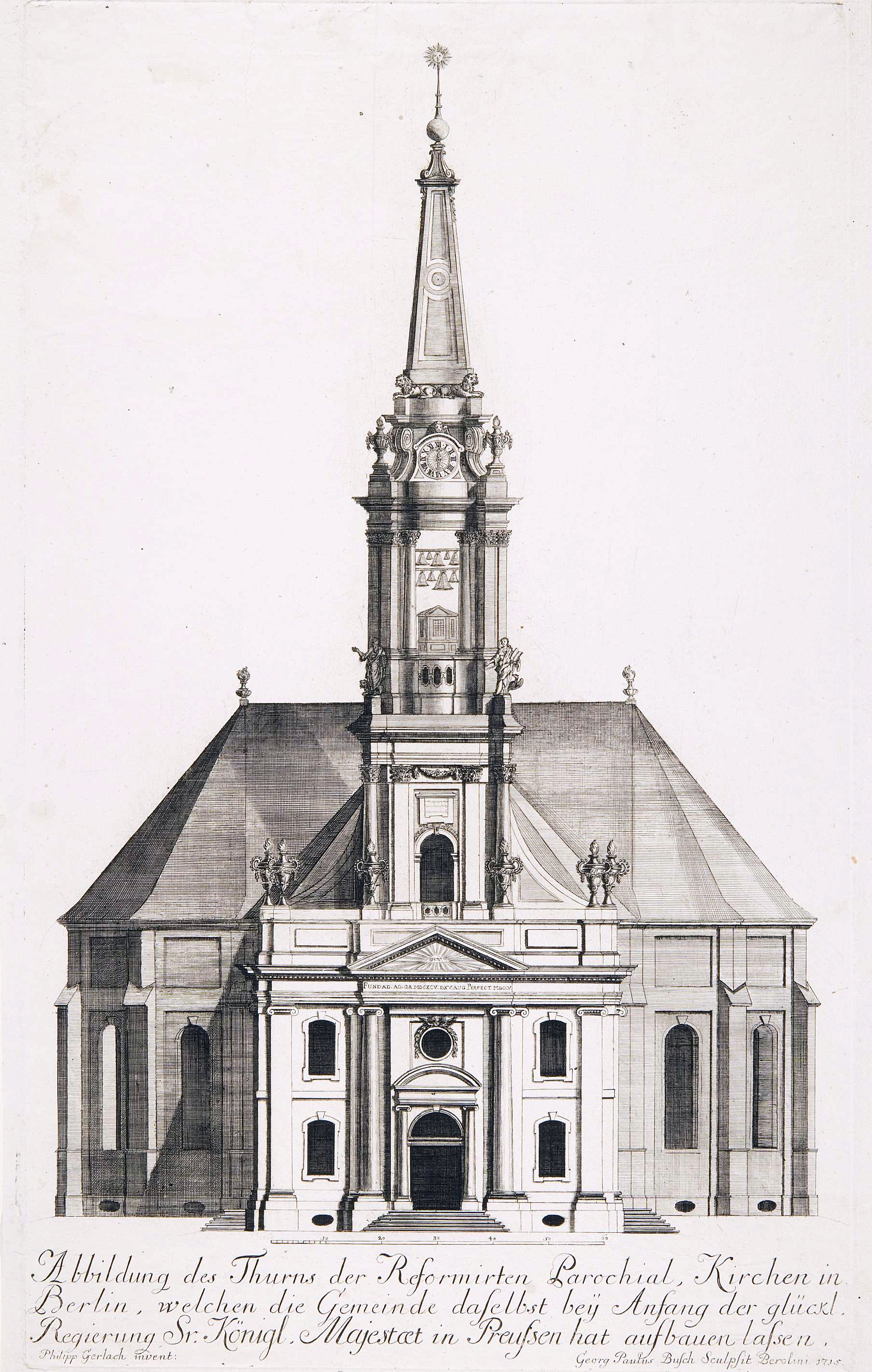 Parochialkirche in Berlin-Mitte (Stich 1715)